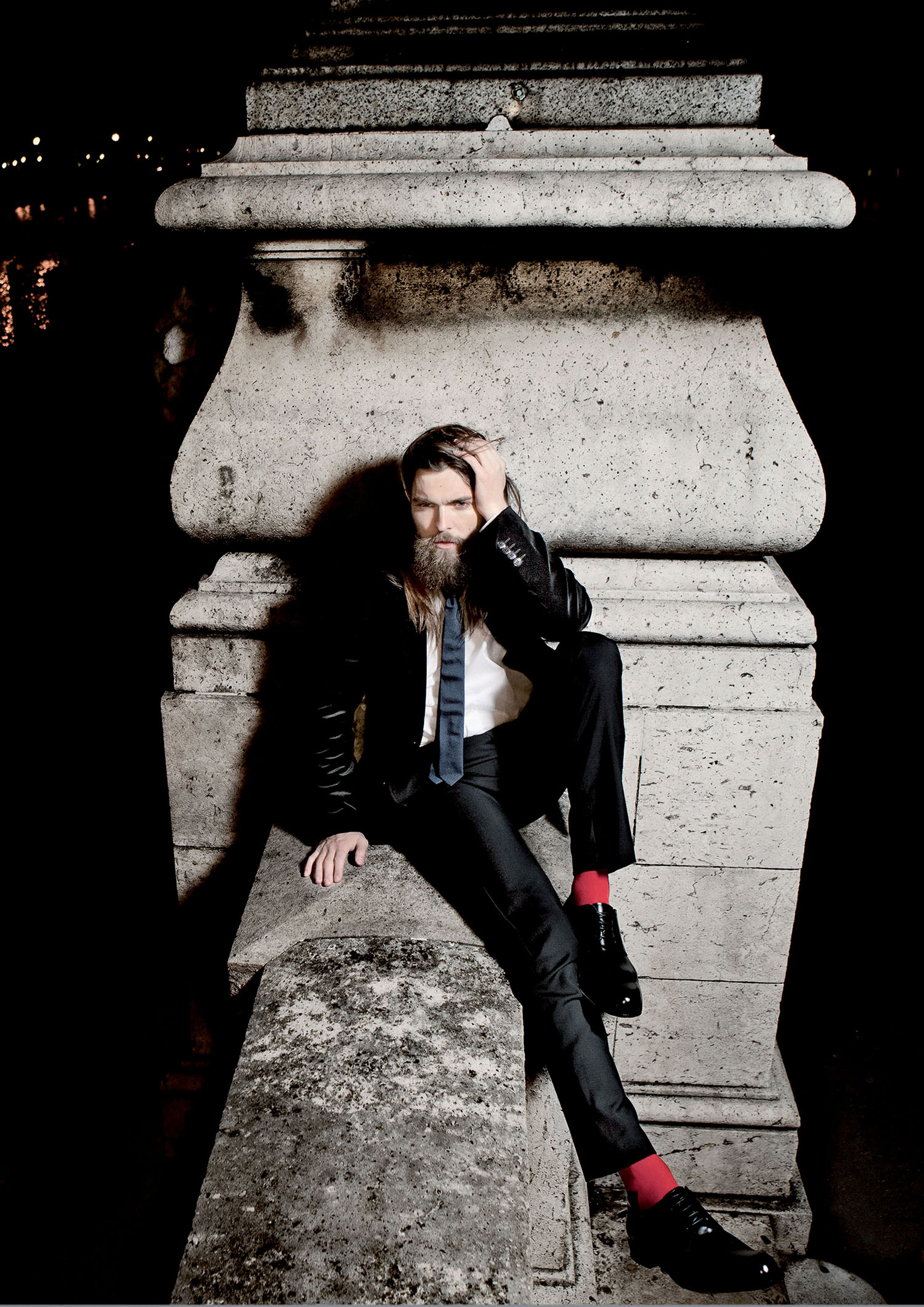 Enok Groven på modelloppdrag i Paris, 2011